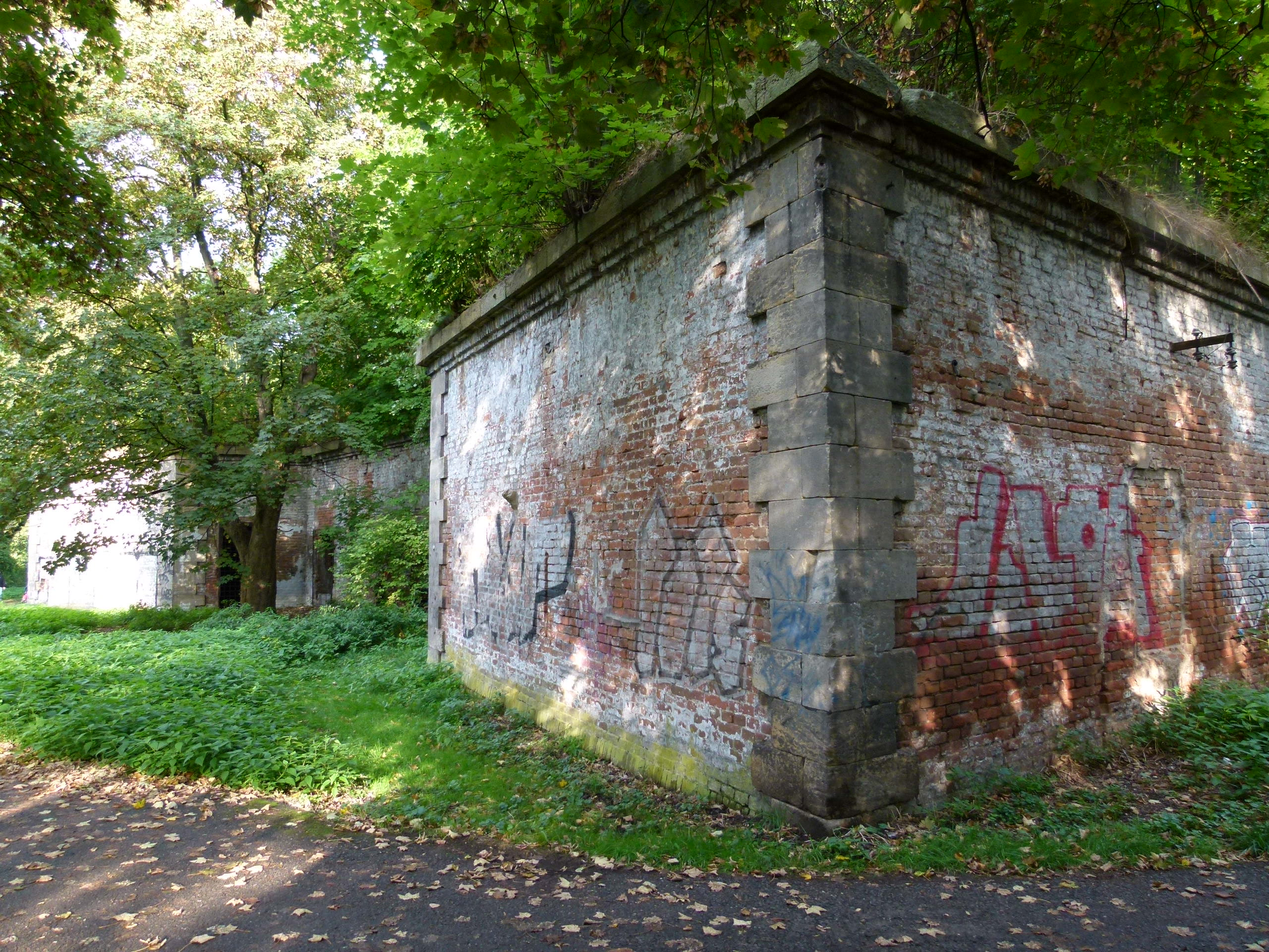 Pevnost Flošna Pivovarská (Hradec Králové), Pivovarská flošna 500/1, Hradec Králové